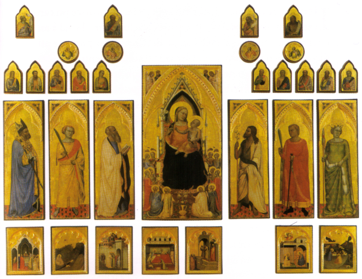 DADDI, Bernardo Polyptych of San Pancrazio Tempera on wood Galleria degli Uffizi, Florence